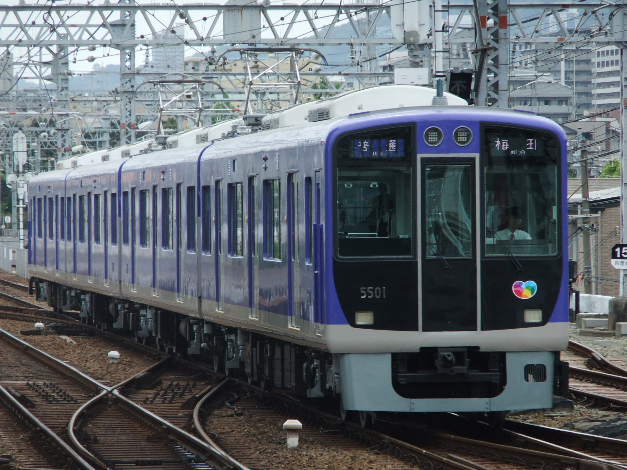 阪神5500系電車 リニューアル車 御影駅